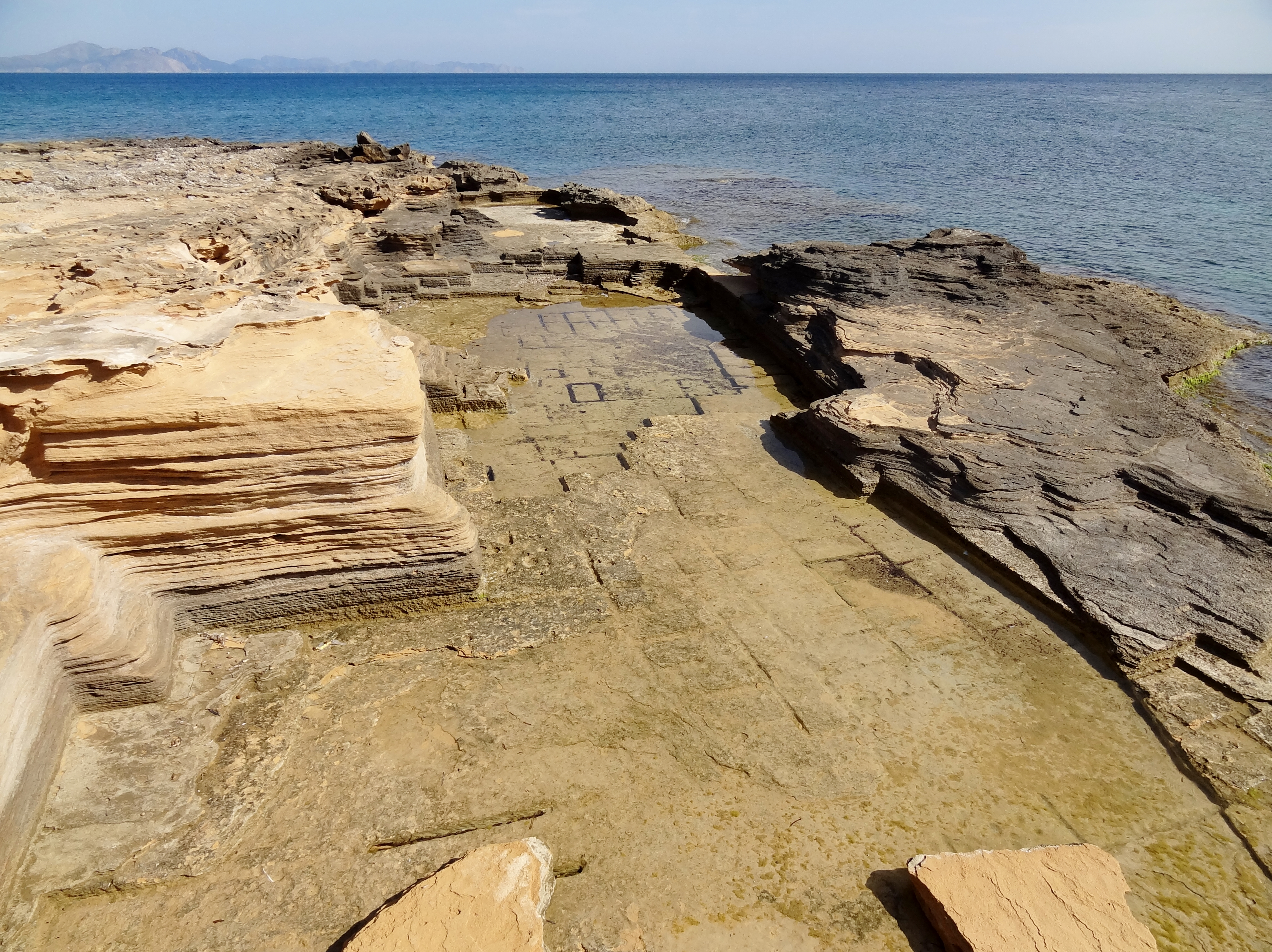 Es Maresos, Gemeinde Artà, Mallorca, Spanien